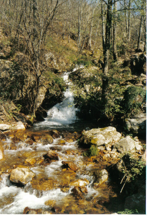 Afluente de la Garganta del Obispo